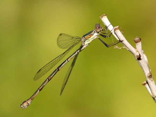 Lestes viridis femella